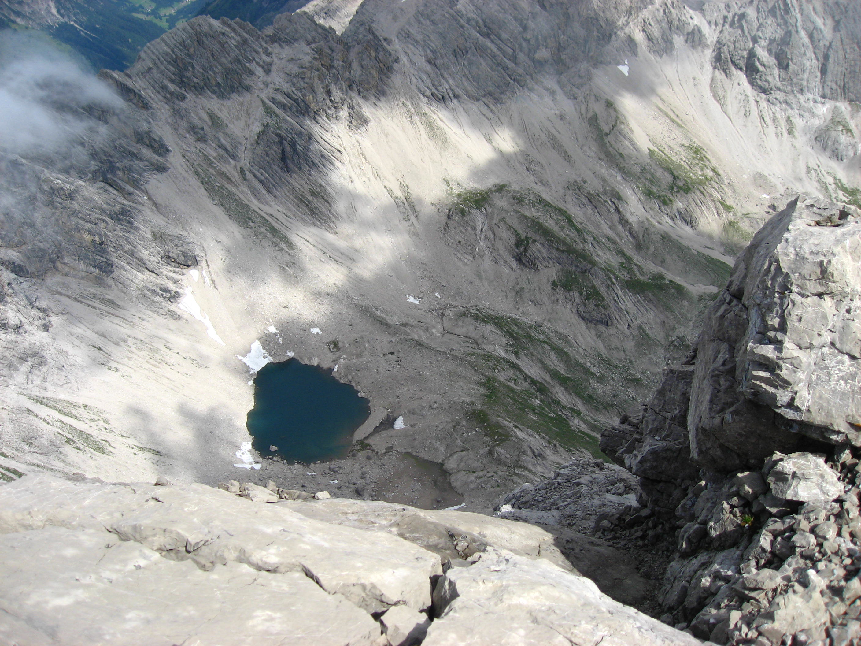 Das Hermannskar mit dem Hermannskarsee (2216 m) in den Allgäuer Alpen, vom Gipfel des Großen Krottenkopfes (2656 m) aus.